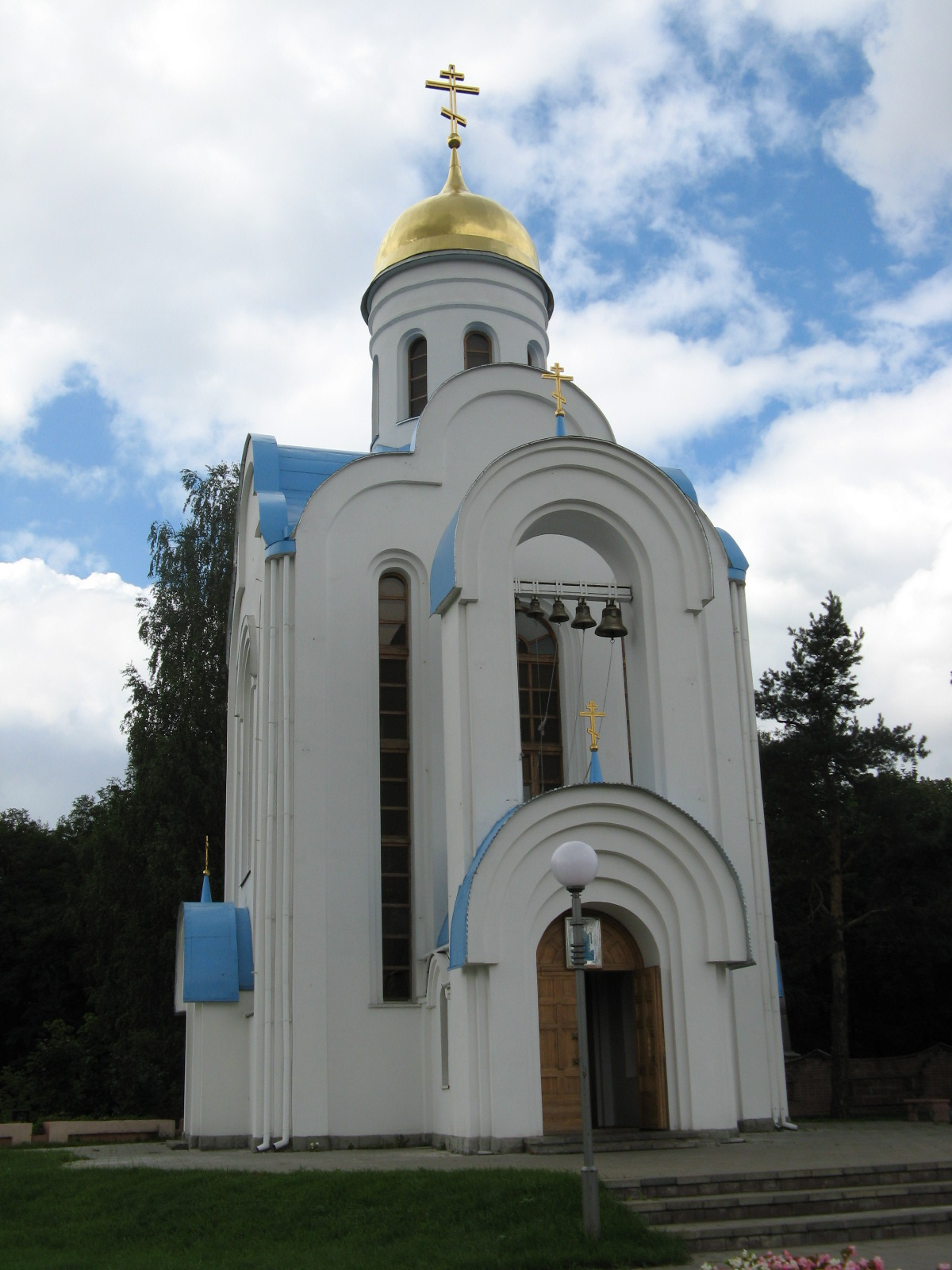 Babrujsk Church Mienskaja street